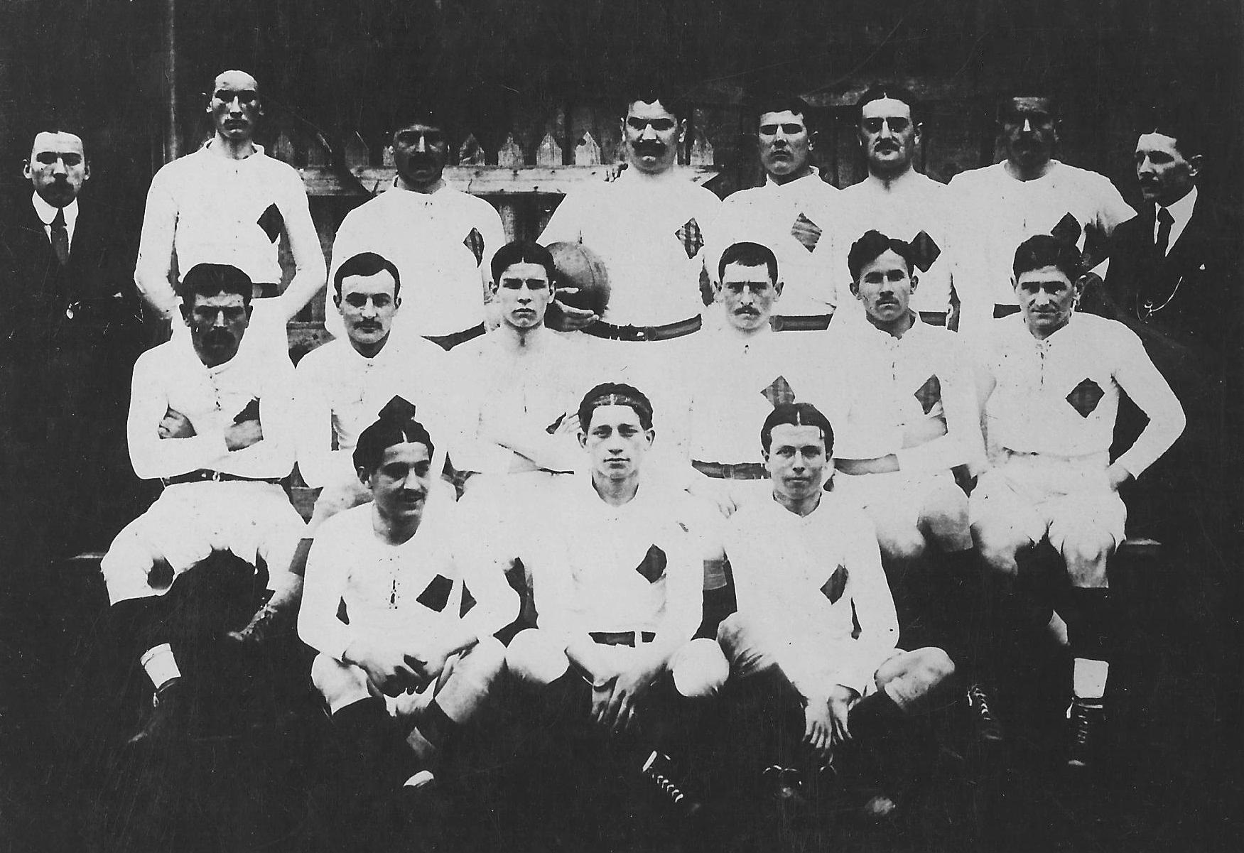 Bordeaux Finale 1914 - ASP (équipe deuxième)